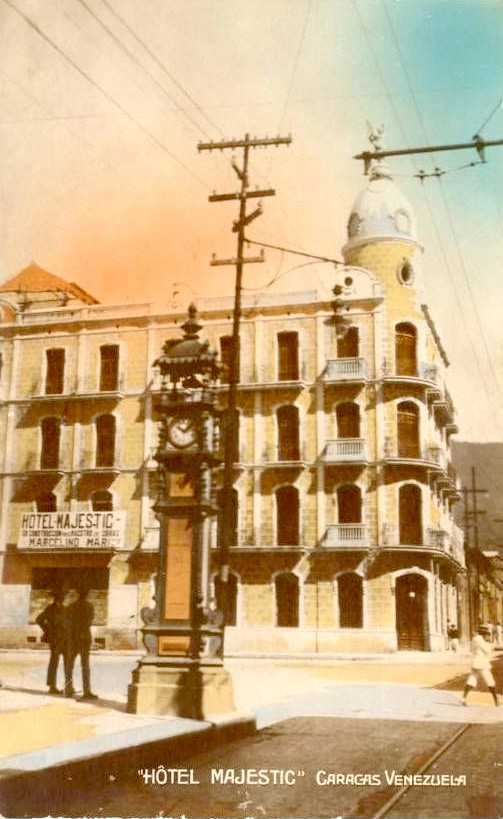 Postal del Hotel Majestic de Caracas, Venezuela. Fue inaugurado en 1930 y dejó de operar por demolición el 18 de febrero de 1949. Fue uno de los hoteles mas prestigiosos de Caracas de esa época. Estaba localizado en la Plaza San Pablo frente al Teatro Municipal.